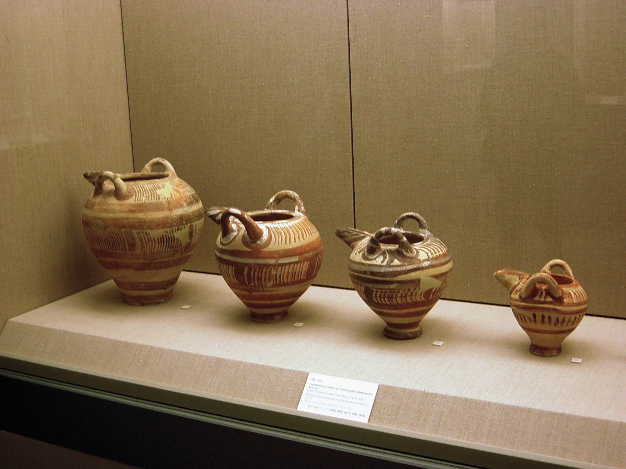 Utilitarian terracotta objects, Museum of Cycladic Culture, Akrotiri excavation artifacts, Santorini, Cyclides, Hellas (Greece)